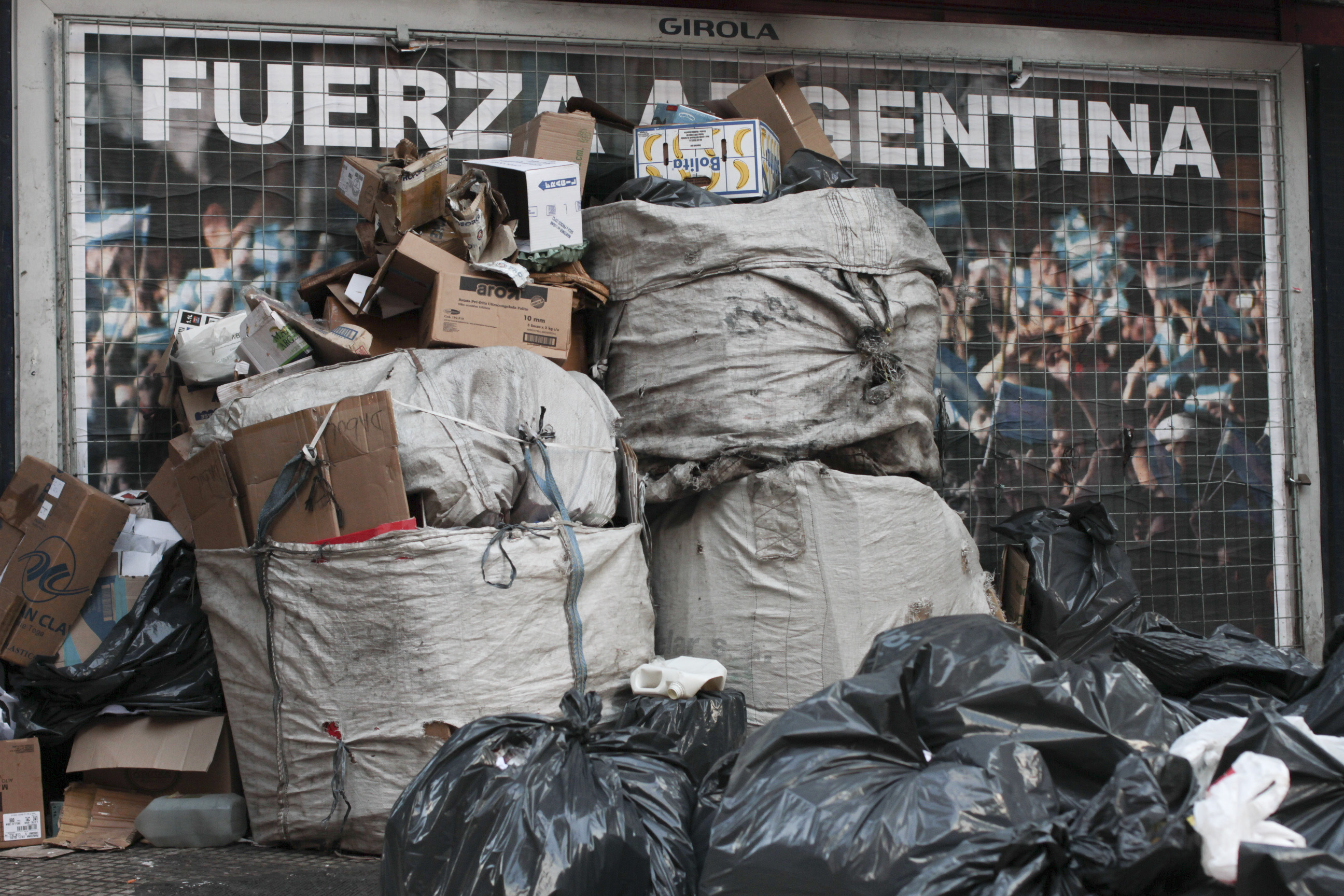 Op verkiezingszondag hoopt het afval zich op voor een poster van Cristina Fernández de Kirchner. Vuilnisophaling is een groot probleem in Buenos Aires. Sinds de economische crisis in 2001 komen ‘cartoneros’ van ver buiten de stad het papier en karton uit de vuilzakken op straat halen. Ze verkopen het per ton aan papierfabrikanten. Microcentro, Buenos Aires. Oktober 2011. La basura se junta los domingos en el centro de Buenos Aires. Calle Florida, Buenos Aires, Argentina.